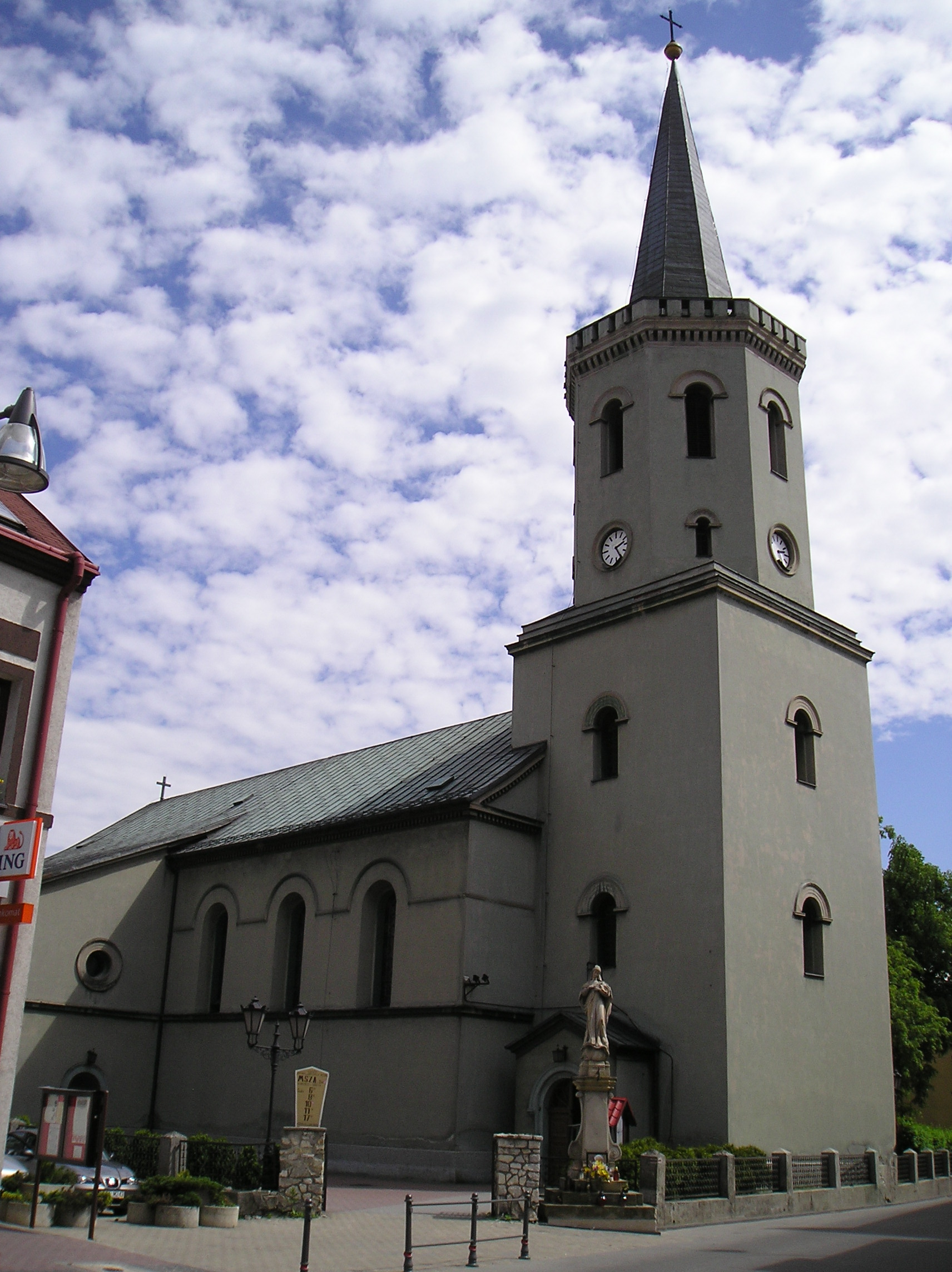 Koscioł parafialny w Bieruniu Starym, archidiecezja katowicka